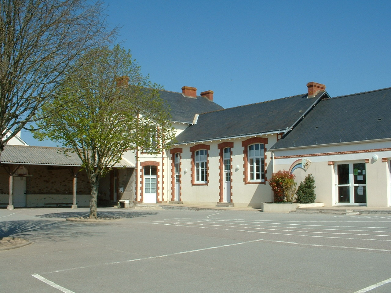 Chauvé (France) - Ecole publique du parc